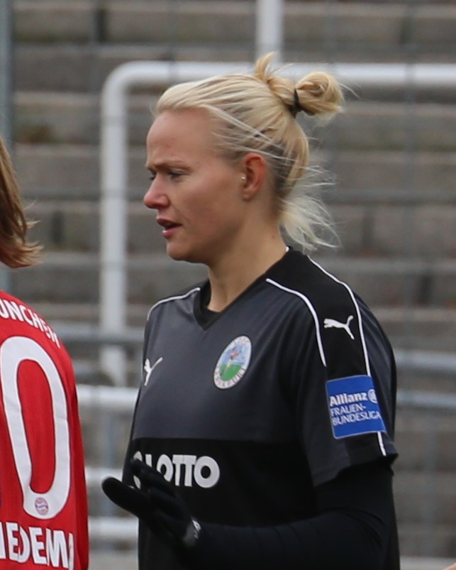 Spielszene im Frauen-Bundesliga-Spiel FC Bayern München gegen 1. FFC Frankfurt am 13. November 2016 im Stadion an der Grünwalder Straße, München (Ergebnis war 1:0).